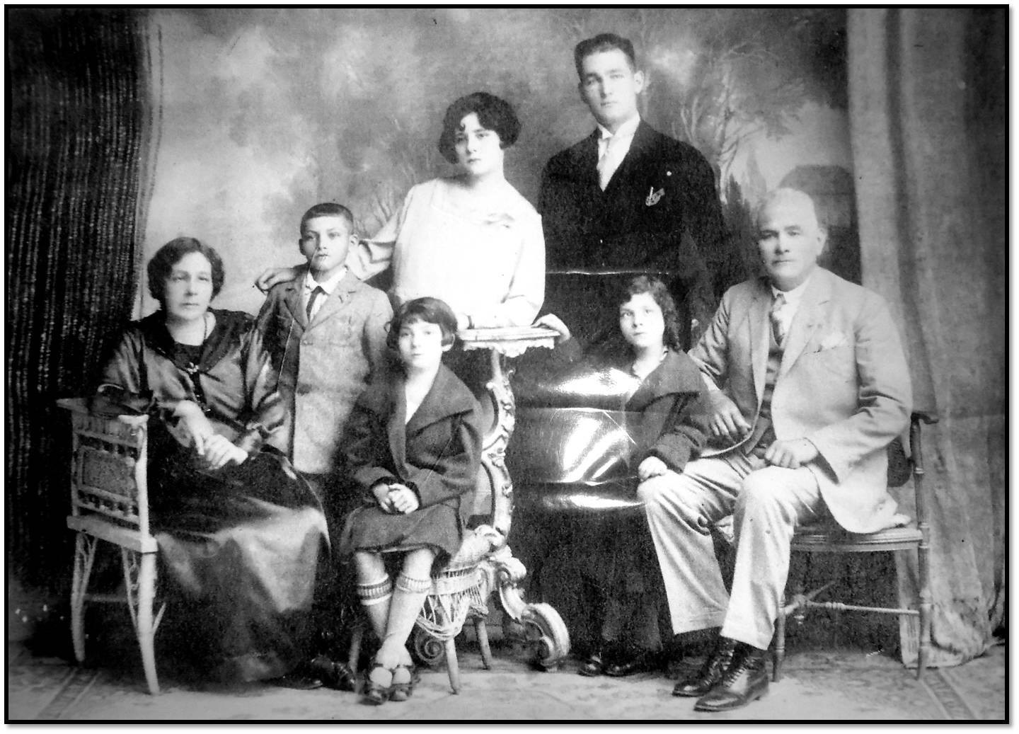 Familia de Juan José Arévalo en los años 20.